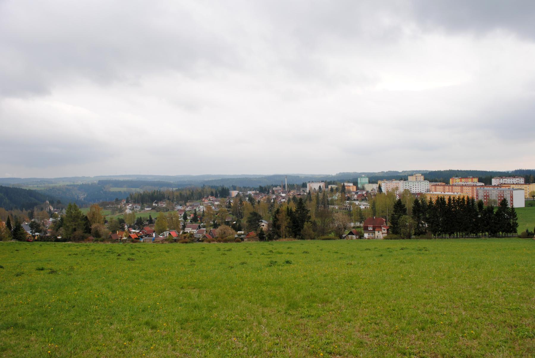 Rotava aus Richtung Oberrothau